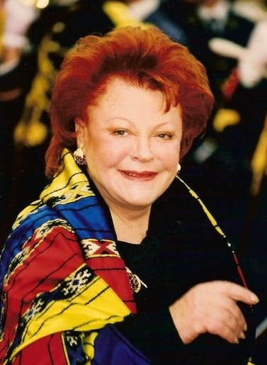 Régine au festival de Cannes.